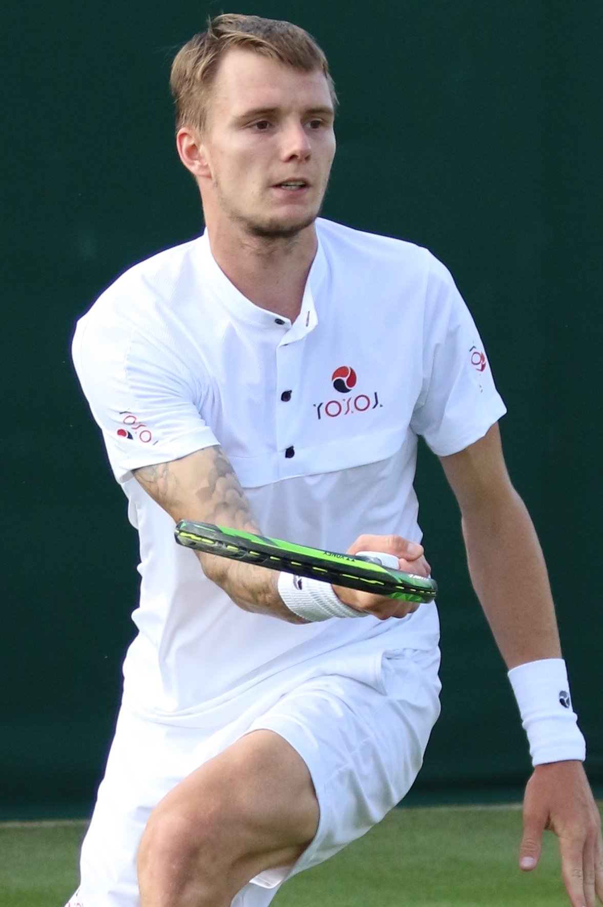 Bublik WM19 (34)